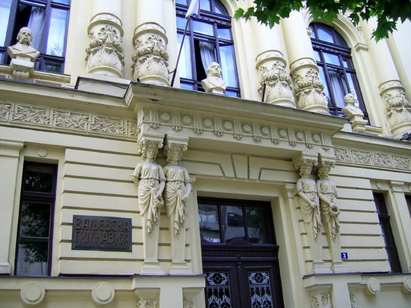 Slikano u Valjevu